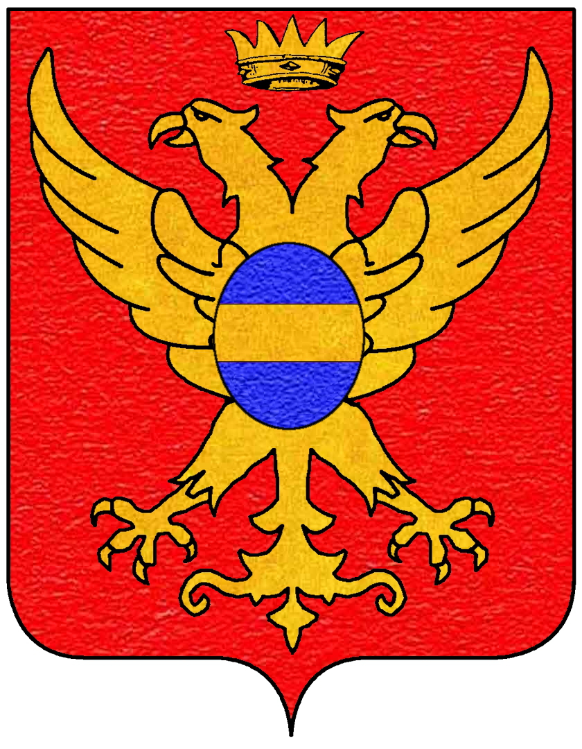 Stemma della famiglia Giustiniani, appartenente al patriziato di Venezia.